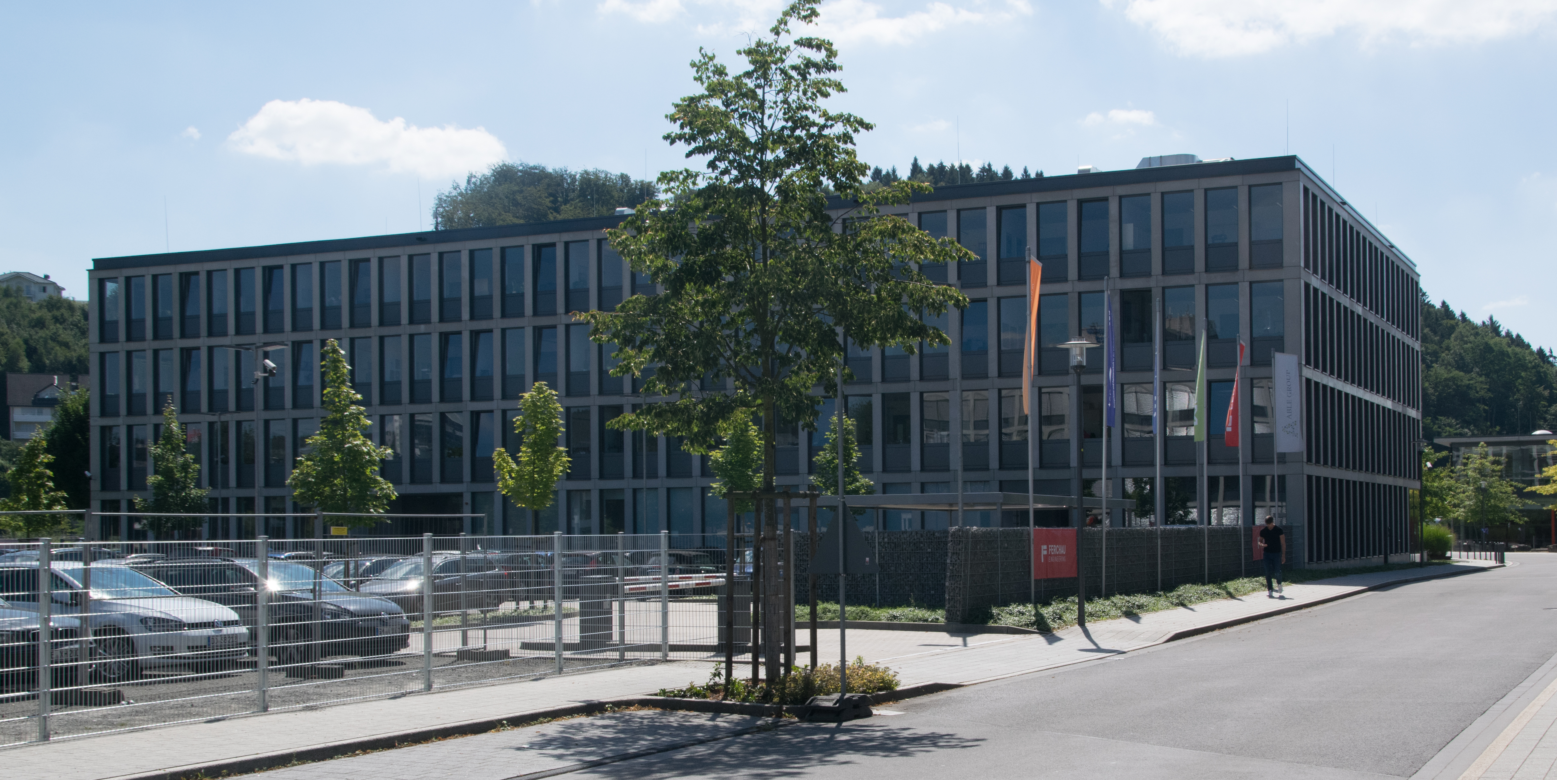 Ferchau Engineering